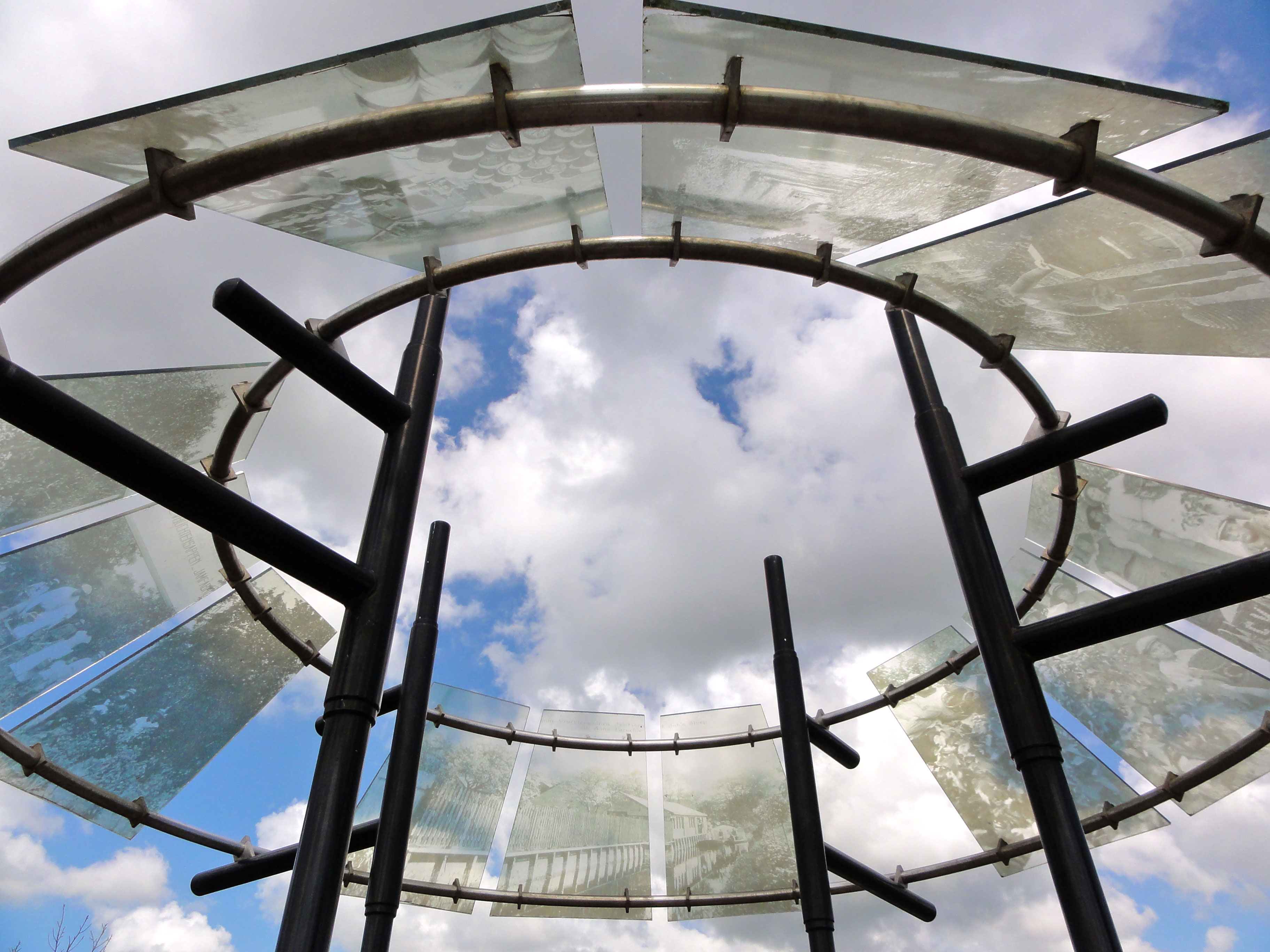 Monument voor de fruitteelt door Henk Rusman in Sint-Annaparochie